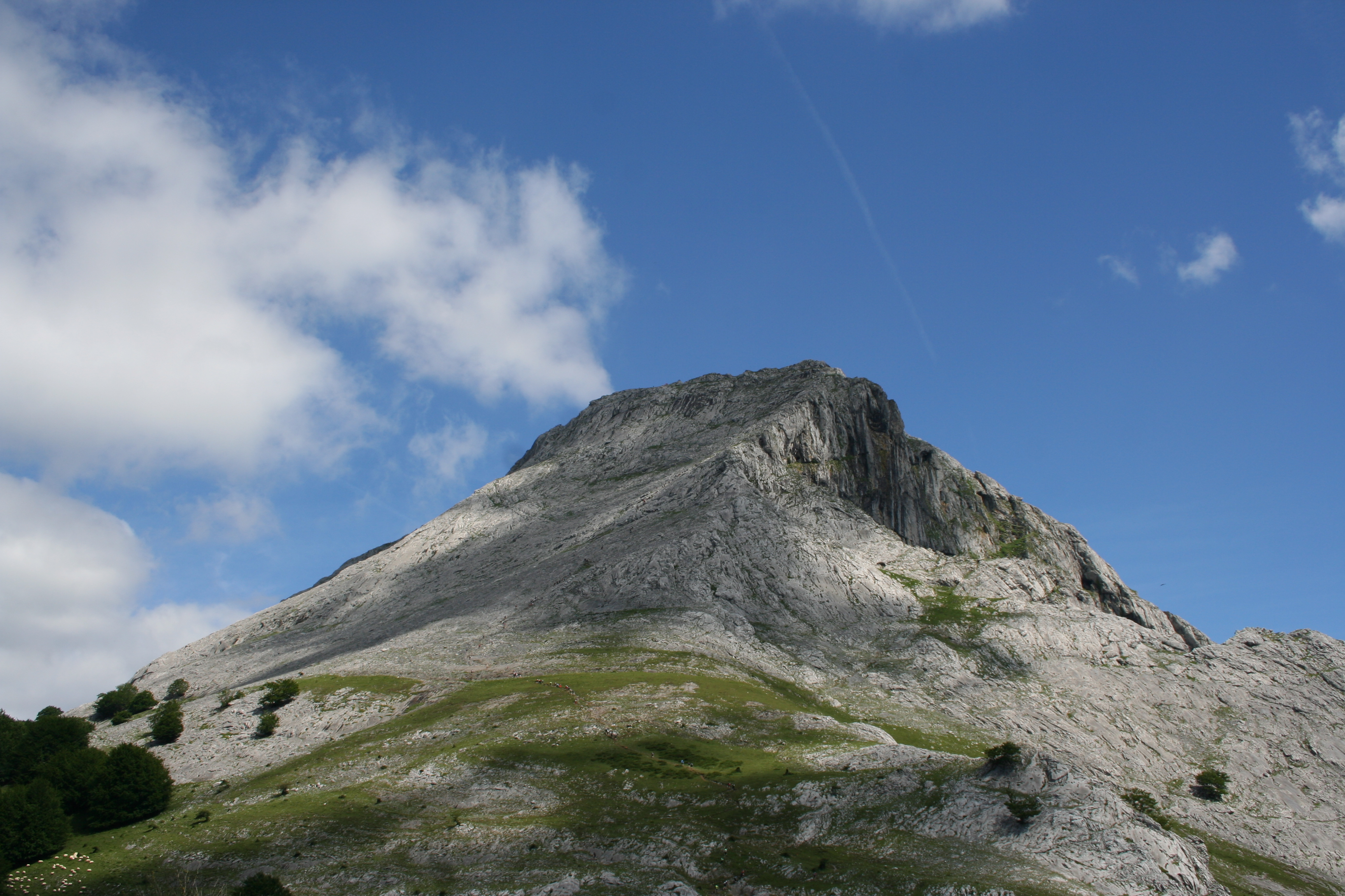 Zabalanditik Anboto